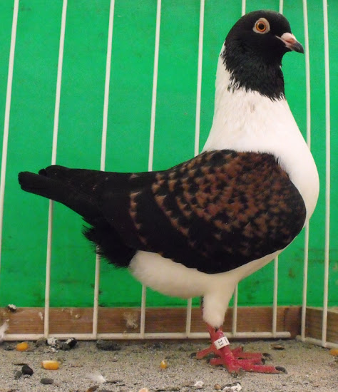 Colorazione rospato del prete nella varietà gazzo.